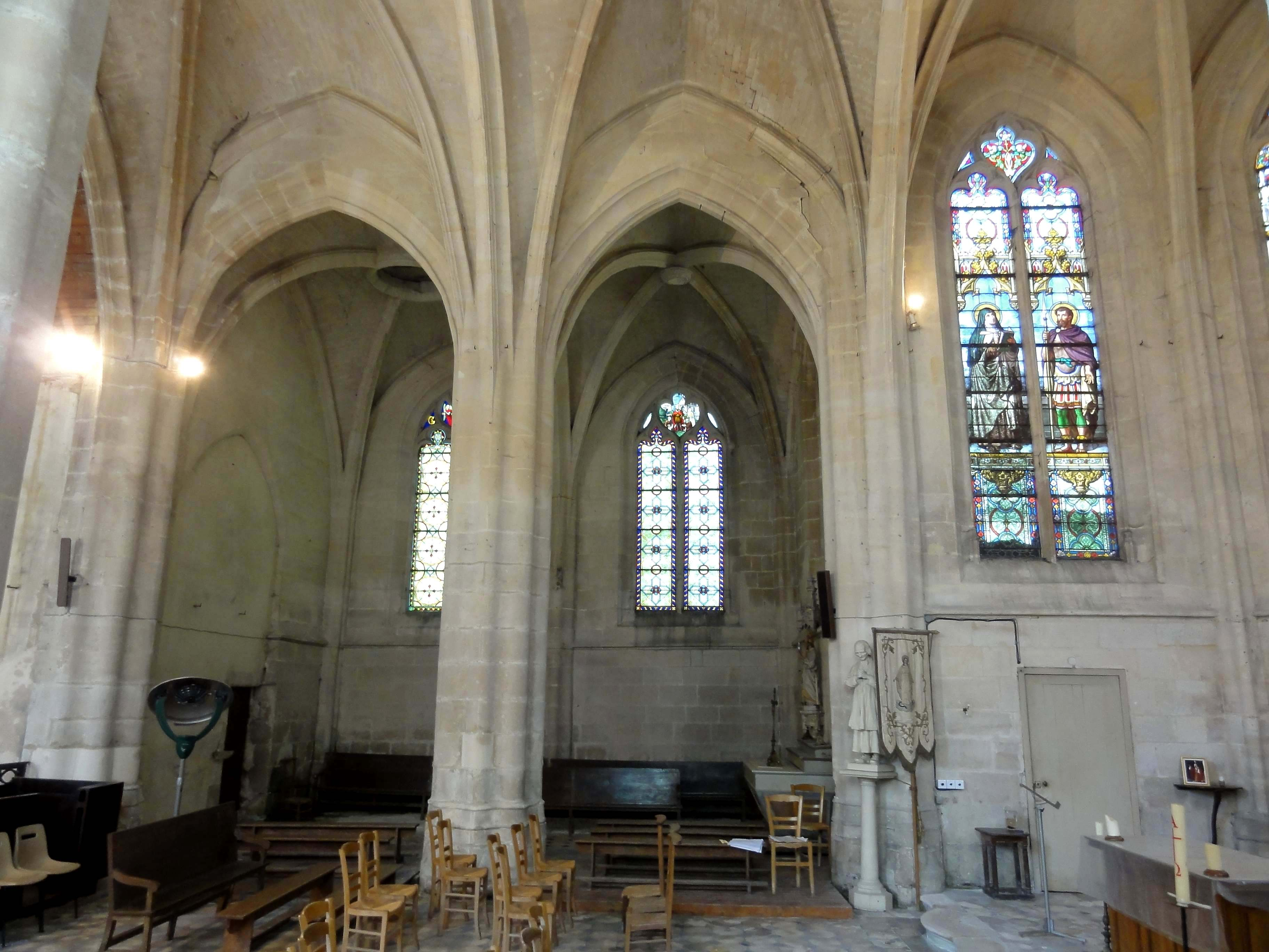 Intérieur de l'église (voir titre).